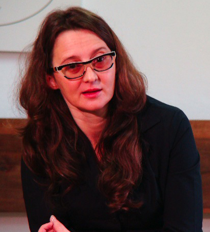 Lucrecia Martel durante coletiva de imprensa na Festa Literária Internacional de Parati, Rio de Janeiro.